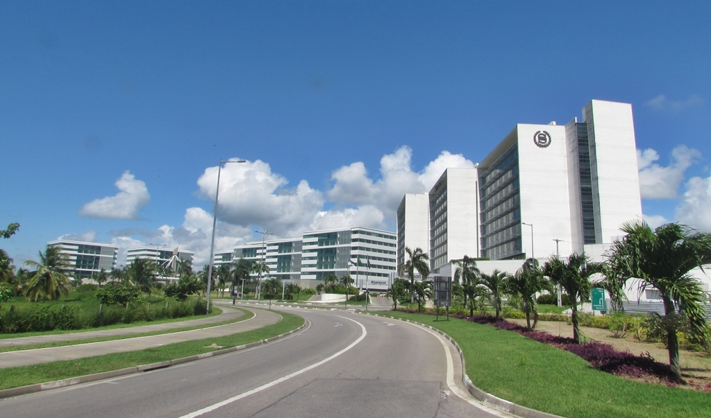 Prédios no bairro da Reserva do Paiva no município do Cabo de Santo Agostinho.